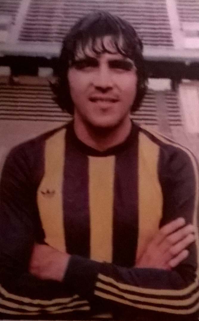 Eduardo Bacas, futbolista argentino década de 1980.